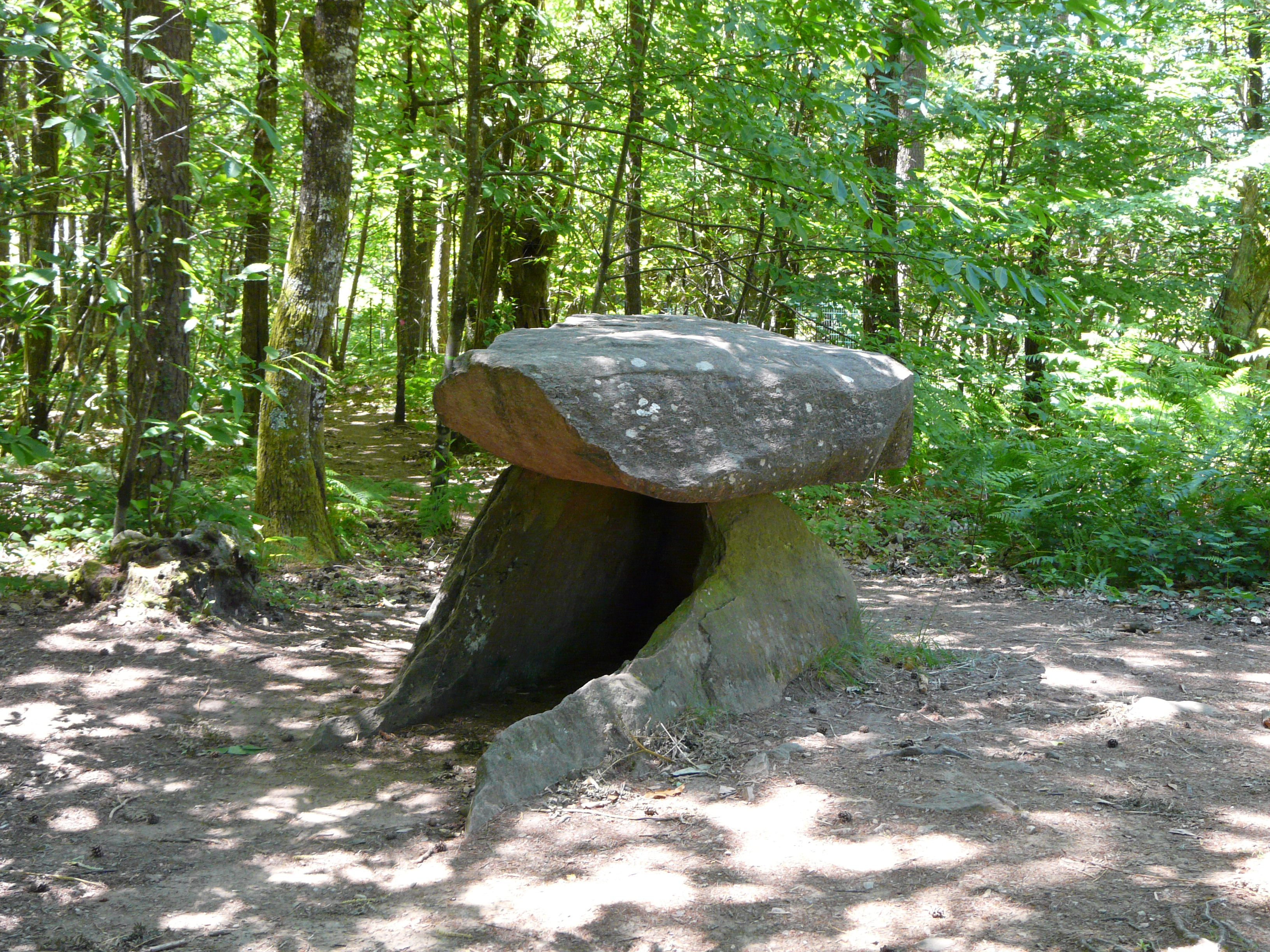 Le dolmen de Rochesseux, Aubazines, Corrèze, France.